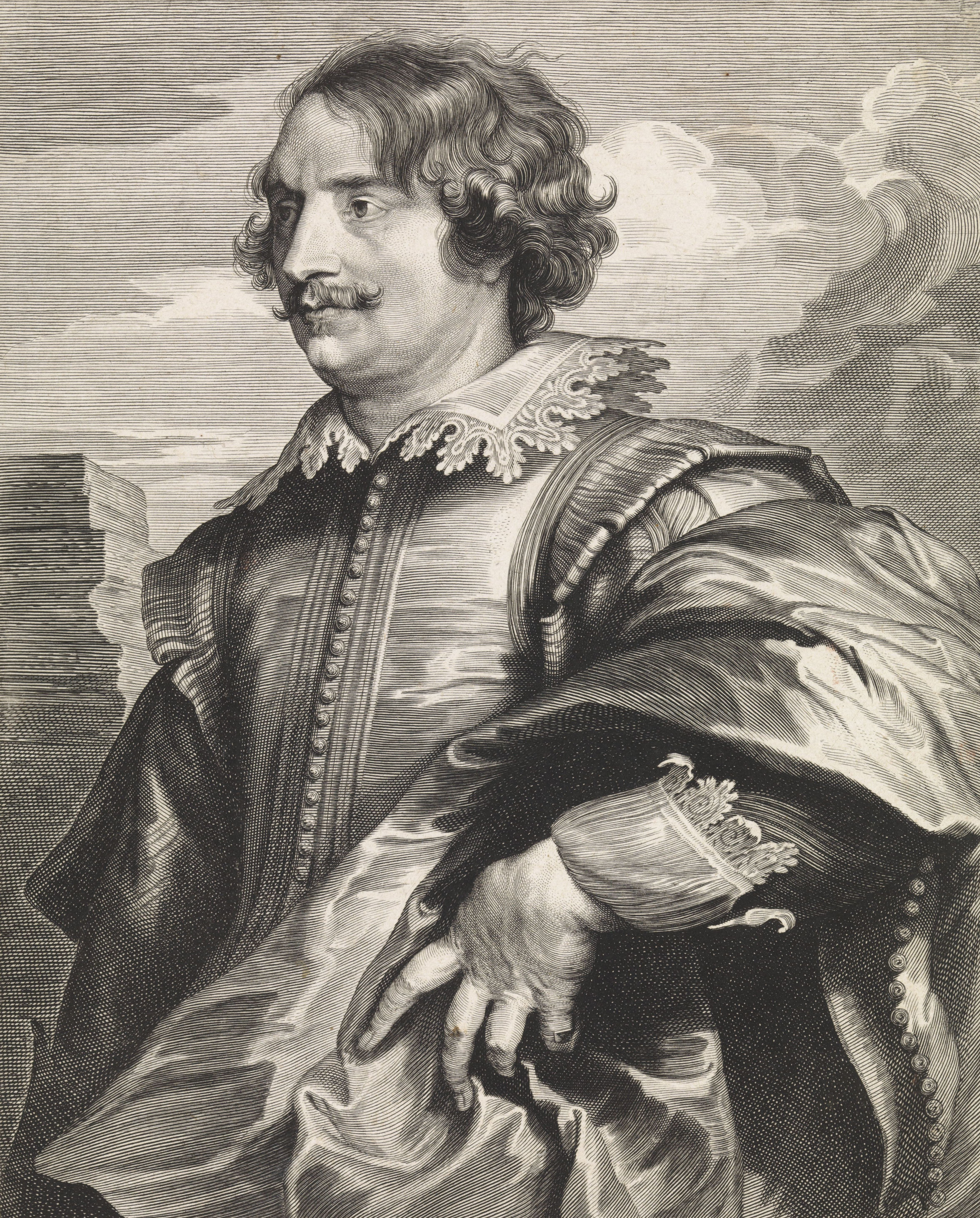 IdentificatieTitel(s): Portret van de graveur Paulus PontiusObjecttype: prent Objectnummer: RP-P-OB-16.482Catalogusreferentie: Hollstein Dutch 114-2(6)New Hollstein Dutch 82-3(7)Mauquoy-Hendricx (van Dyck) 59-2(6)FMP 4265Opschriften / Merken: verzamelaarsmerk, verso linksonder, gestempeld: Lugt 240VervaardigingVervaardiger: prentmaker: Paulus Pontiusnaar schilderij van: Anthony van Dyck (vermeld op object)uitgever: Martinus van den Enden (vermeld op object)verlener van privilege: onbekend (vermeld op object)Plaats vervaardiging: AntwerpenDatering: 1616 - 1657Fysieke kenmerken: gravureMateriaal: papier Techniek: graveren (drukprocedé)Afmetingen: blad: h 245 mm × b 182 mmOnderwerpWat: portrait, self-portrait of graphic artistWie: Paulus PontiusVerwerving en rechtenVerwerving: overdracht van beheer 1816Copyright: Publiek domein